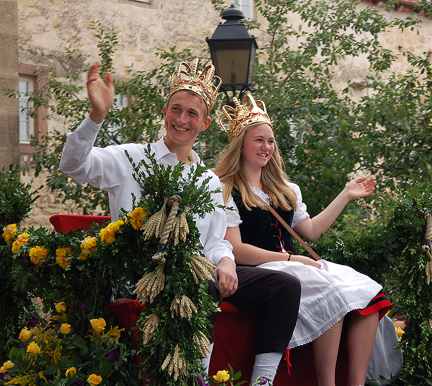 Schäferlauf Markgröningen 2014: Schäferkönigspaar des Vorjahrs auf Kutsche